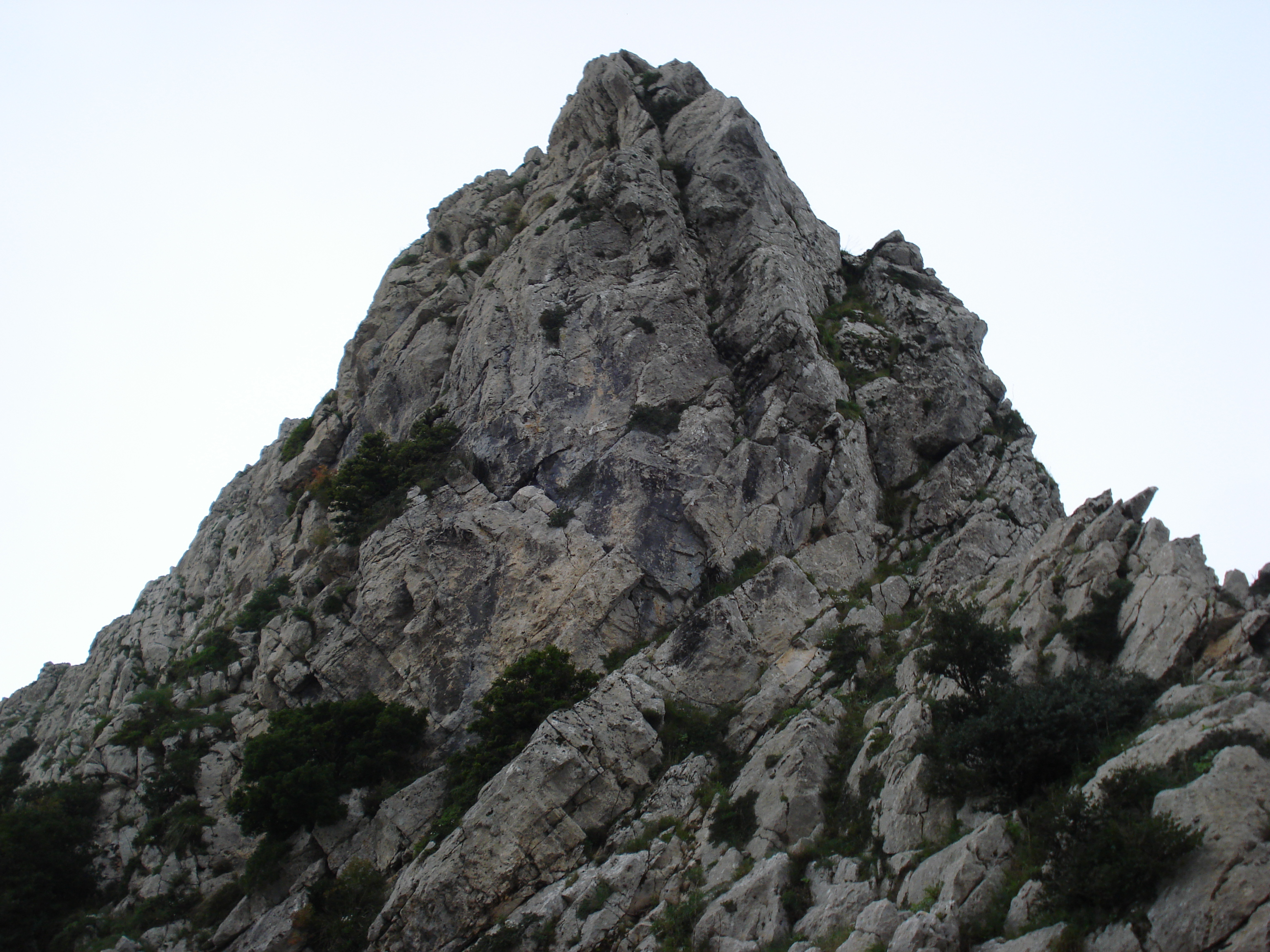 Ras El Gassâa (Sommet du Jebel Zaghouan), Zaghouan, Tunisie